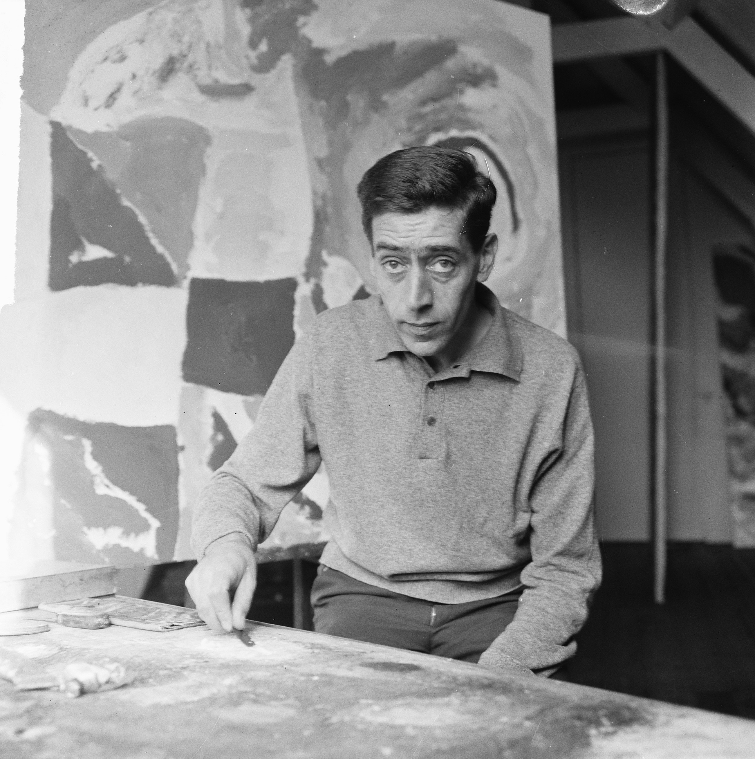 Collectie / Archief : Fotocollectie Anefo Reportage / Serie : [ onbekend ] Beschrijving : Jef Diederen (schilder) (kop) Datum : 24 september 1964 Trefwoorden : KOPPEN, schilders Fotograaf : Pot, Harry / Anefo Auteursrechthebbende : Nationaal Archief Materiaalsoort : Negatief (zwart/wit) Nummer archiefinventaris : bekijk toegang 2.24.01.03 Bestanddeelnummer : 916-9155